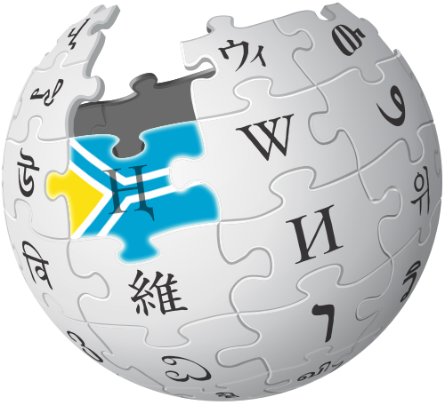 Тыва дыл: Тыва Википедияның бир янзы демдээ